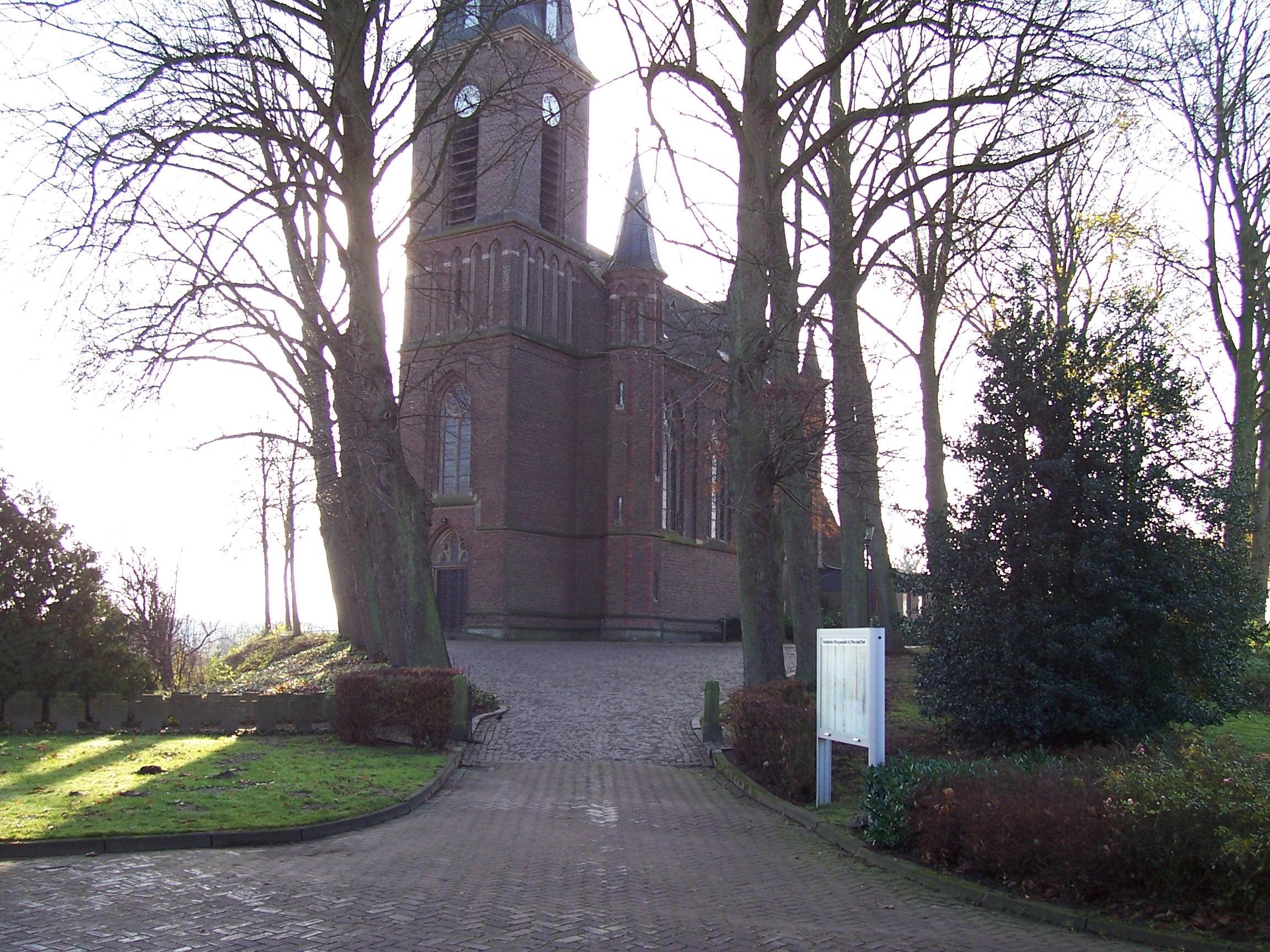 St. Peter und Paul Werth Westfalen